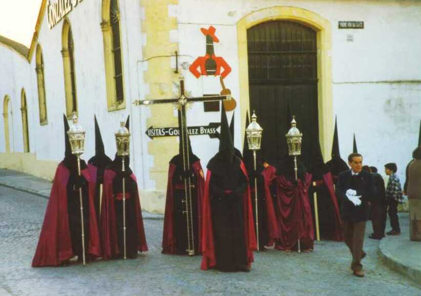 Nazarenos de la Hermandad de Viga (Jerez) Foto tomada por Sanbec